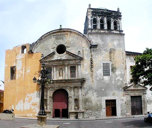 Convento de Santo Domingo, en Cartagena de Indias, Colombia